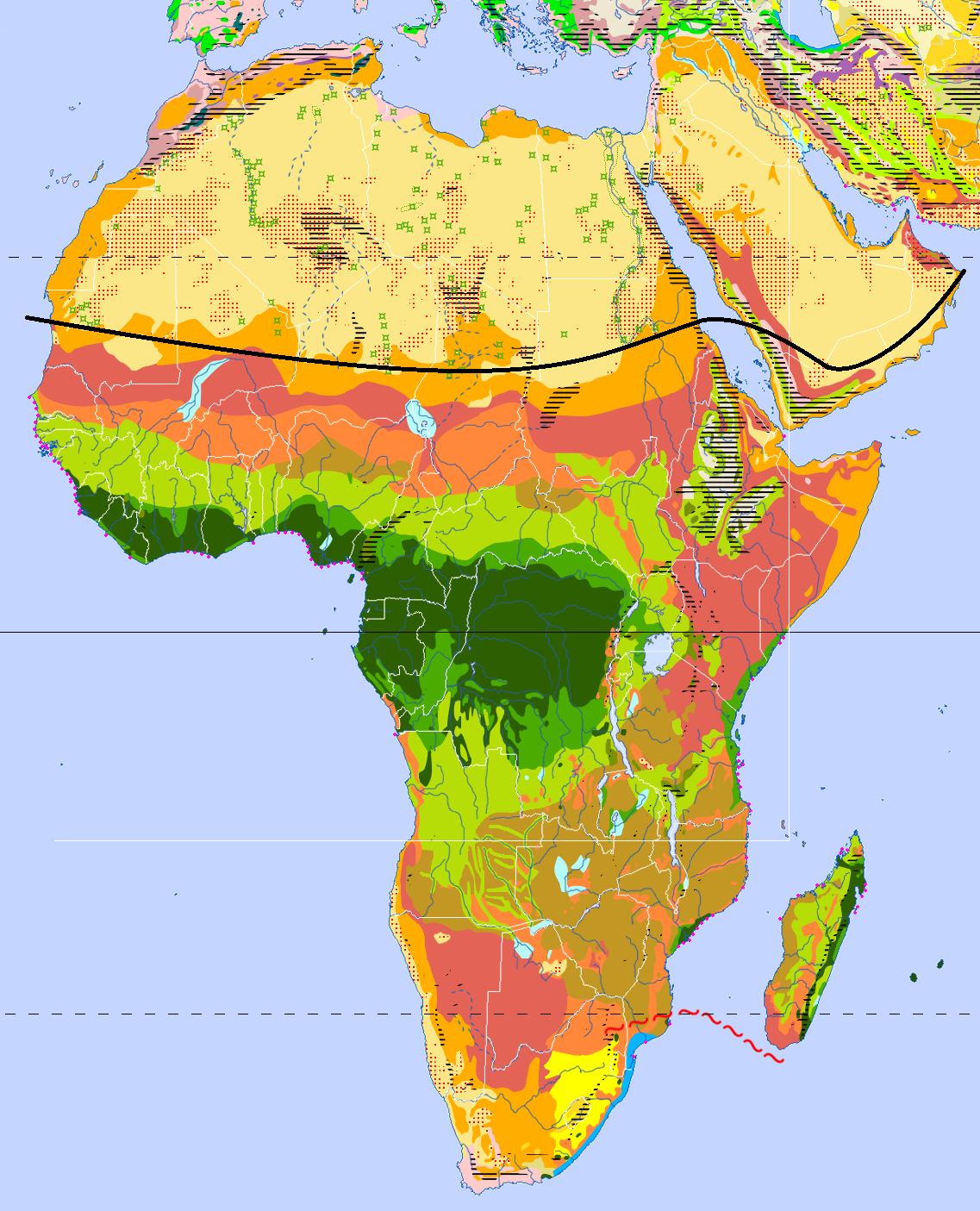 Information {2 } Eisschilde u. Gletscher {2 } Immergrüner borealer Nadelwald {2 } Winterkalte Halbwüsten {2 } Trockensavannen {2 } Kältewüste {2 } Gebirgs-Nadelwälder {2 } Winterkalte Wüsten {2 } Dornstrauch- u. Kakteensavannen {2 } Flechten- u. Moostundra {2 } Gemäßigte Küsten-Regenwälder {2 } Hartlaubvegetation {2 } Tropische Trockenwälder {2 } Zwergstrauch- u. Wiesentundra {2 } Laub- u. Nadelmischwälder {2 } Heiße Halbwüsten {2 } Regengrüne Feuchtsavannen {2 } Bergtundra, alpine Matten u. Heiden {2 } Gemäßigte Laub- u. Auenwälder {2 } Heiße Wüsten {2 } Trop. u. ʅ Subtrop. Regengrüne Feuchtwälder {2 } Laubholz Waldtundra u. boreale Auen {2 } Gemischte Waldsteppen {2 } Hochlandsteppen u. -wüsten {2 } Trop. u. ʅ Subtrop. Regenwälder {2 } Nadelholz Waldtundra {2 } Grassteppen u. Salzwiesen {2 } Subtropische Trockenwälder {2 } Tropische Gebirgsregenwälder {2 } Sommergrüner borealer Nadelwald {2 } Strauch- u. Trockensteppen {2 } Subtropische Feuchtwälder {2 } Riedsümpfe u. flutende Wasserpflanzen ≡ = Gebirgszüge ::: = vegetationslose Wüstenregionen ⋮¤⋮ = Oasenvegetation (z.T. mit Begrenzung) ••• = Mangrovenküsten